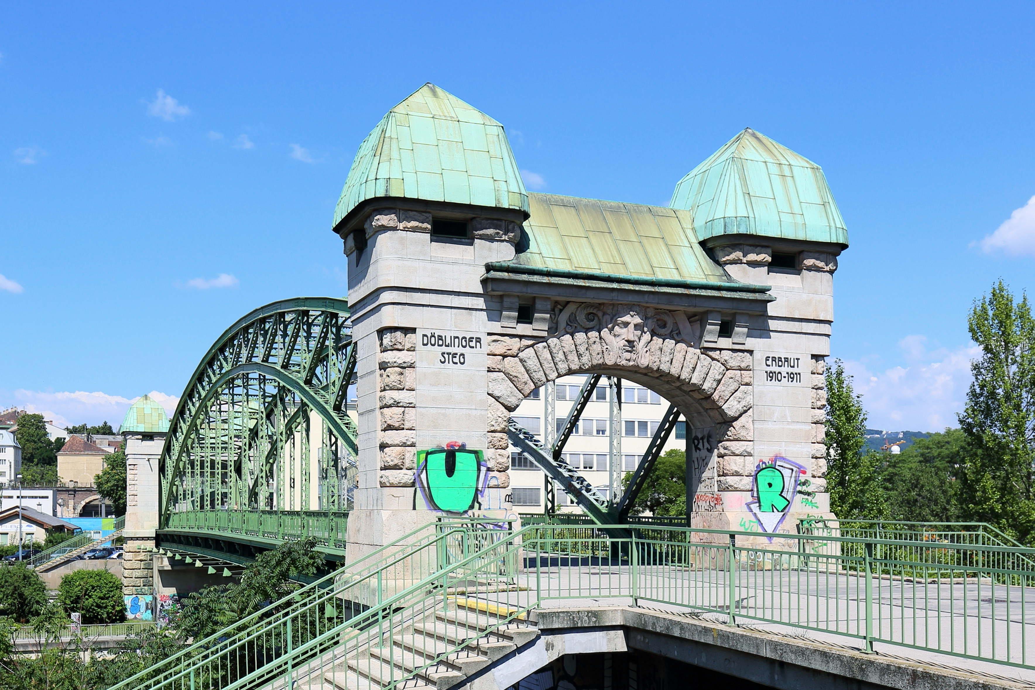 Südostansicht des Döblinger Steges. Er führt über den Donaukanal in Wien und verbindet die Bezirke Döbling und Brigittenau. Die Rohr- und Fussgängerbrücke wurde in den Jahren 1910/11 nach Plänen des Architekten Friedrich Jäckel errichtet.